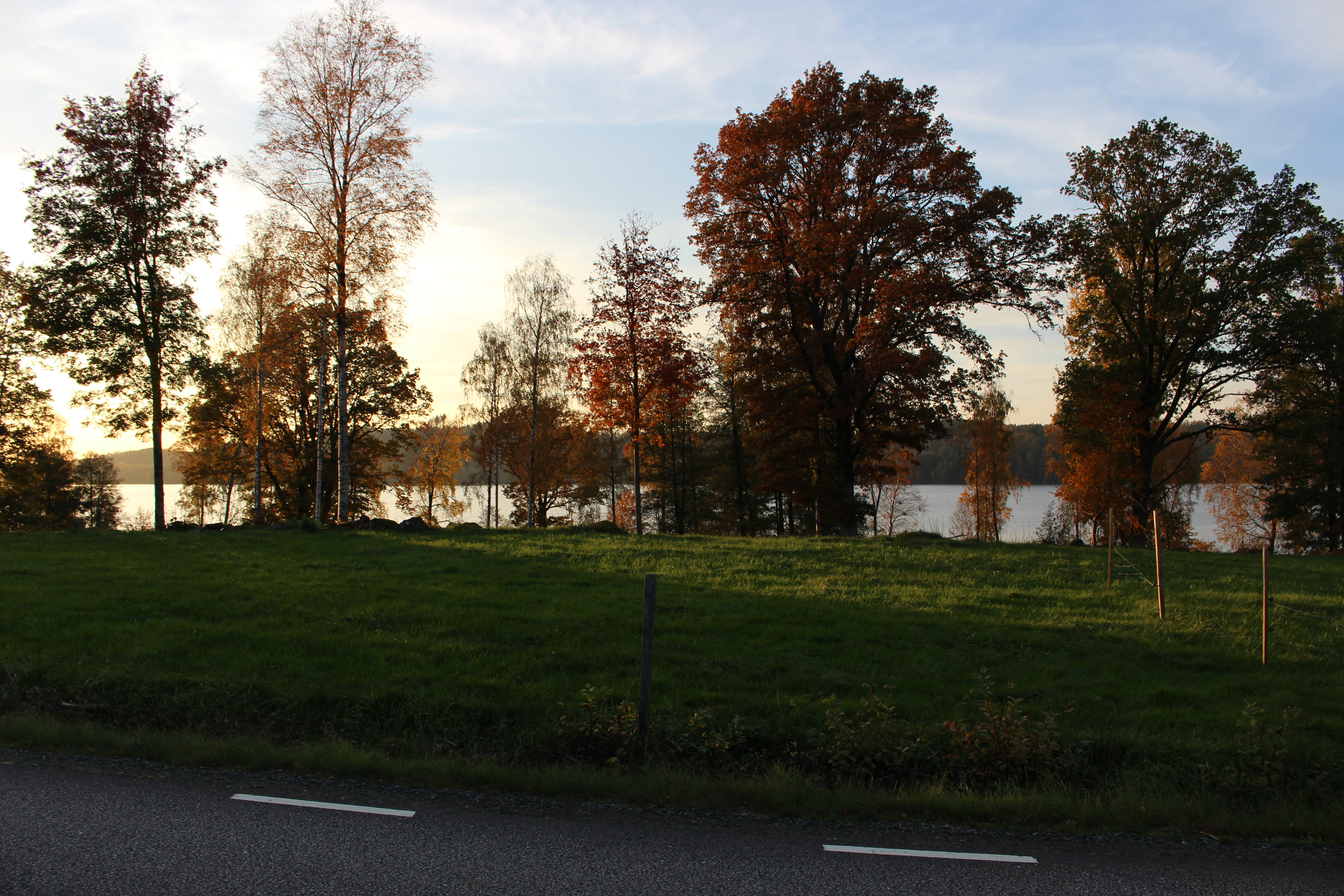 Östra Öresjön sedd från öster vid solnedgången. Bilden är tagen utmed Öresjövägen mellan Torestorp och Kinna.